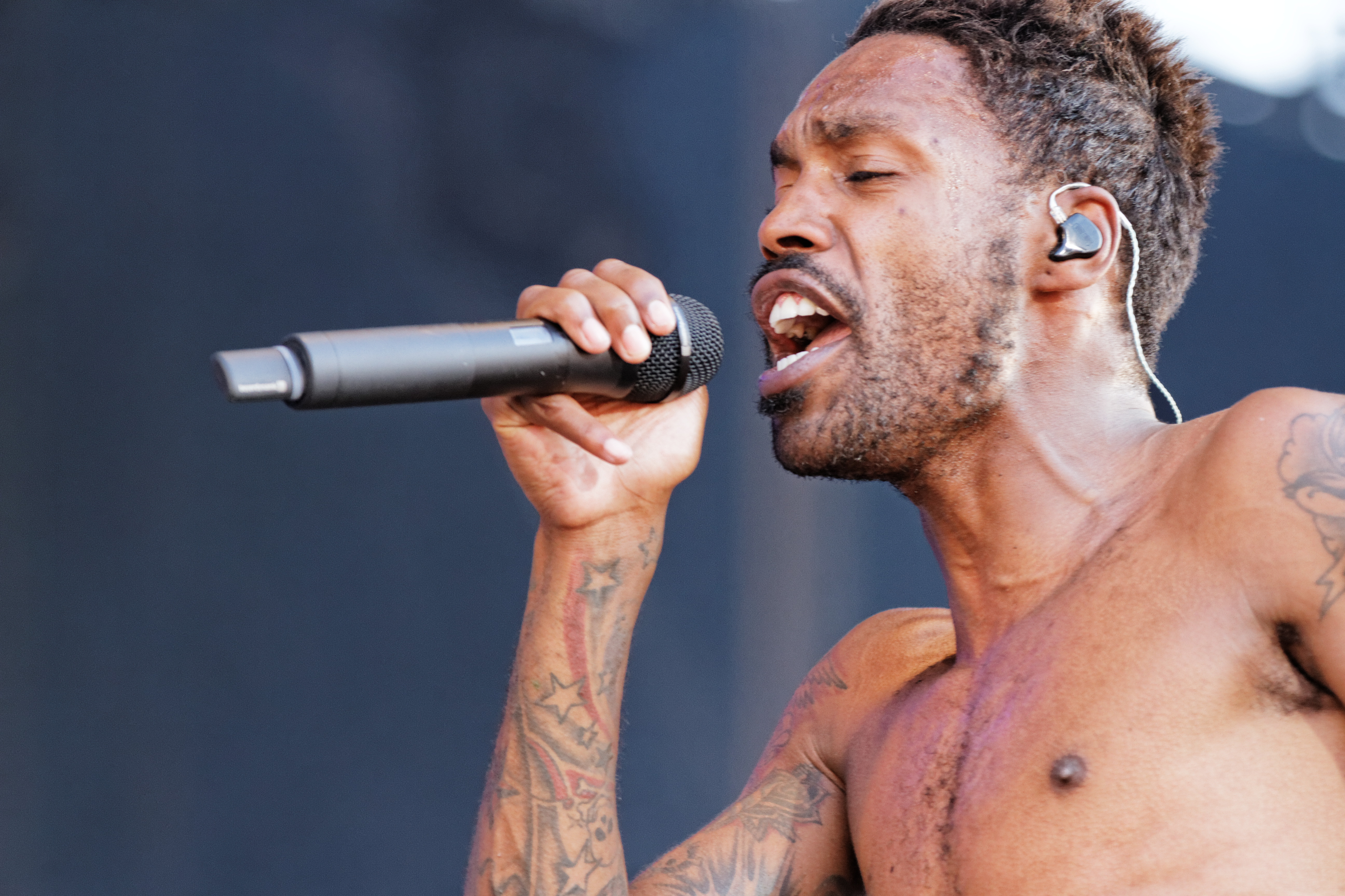 Skip The Use en concert sur la scène Kerouac lors du festival des Vieilles Charrues 2014.